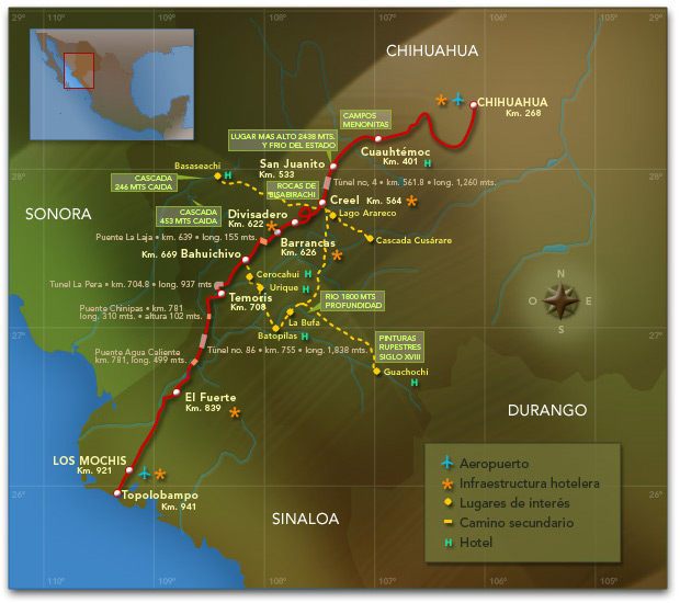 Ruta